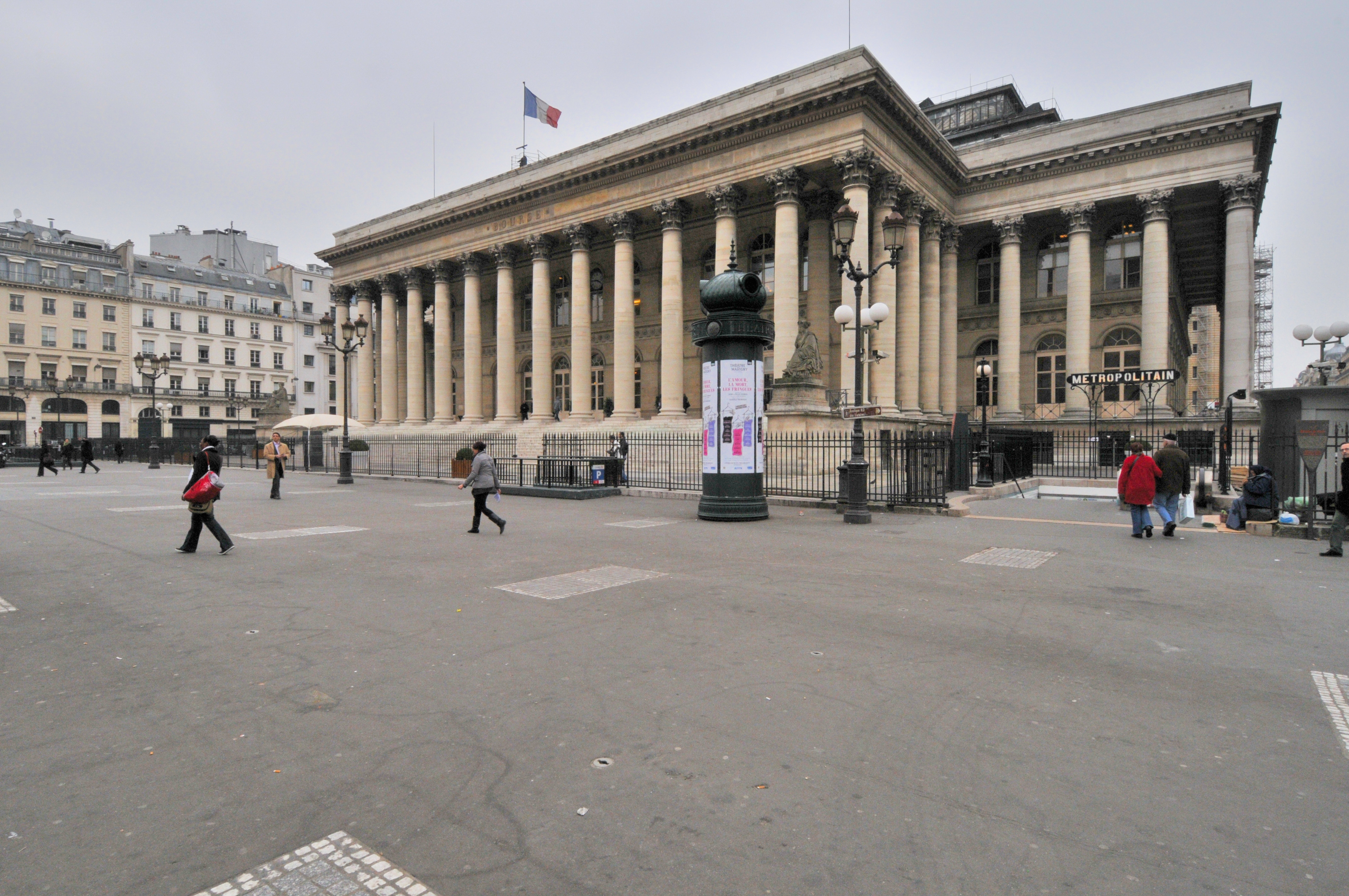 Bourse de Paris